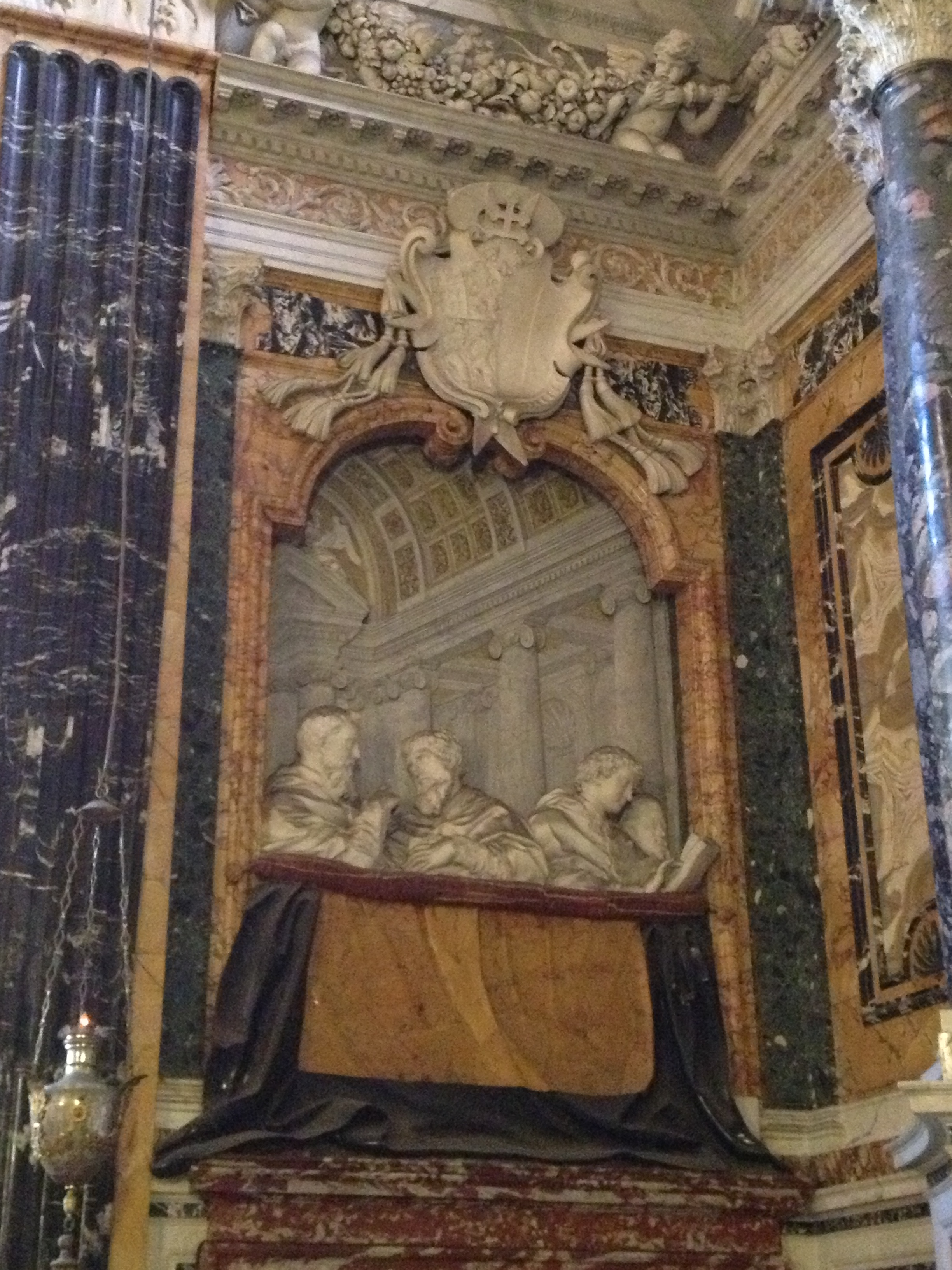 Chiesa di Santa Maria della Vittoria a Roma - Cappella Corner - membri della famiglia